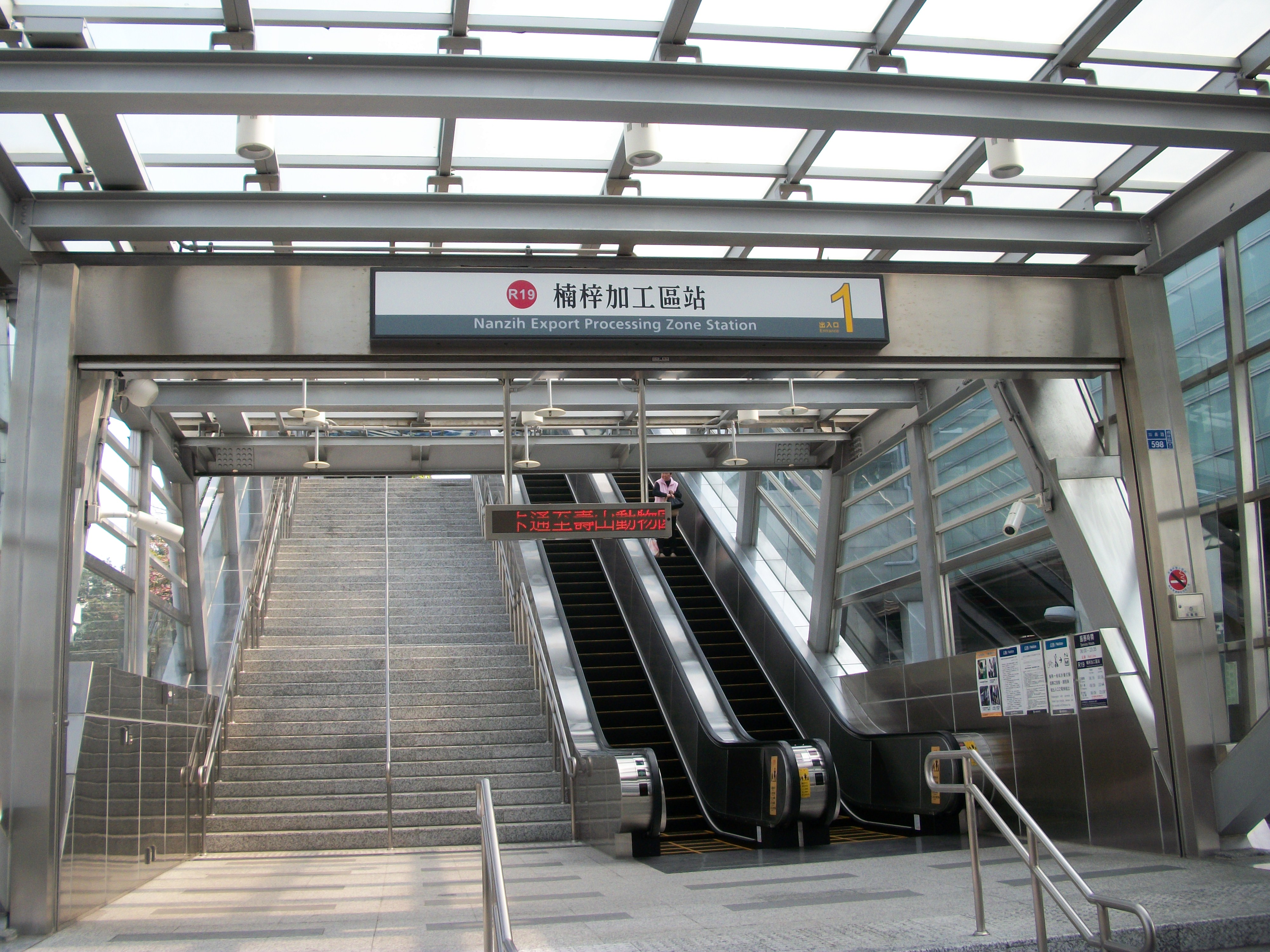 中文（台灣）: 高雄捷運楠梓加工區站1號出口。